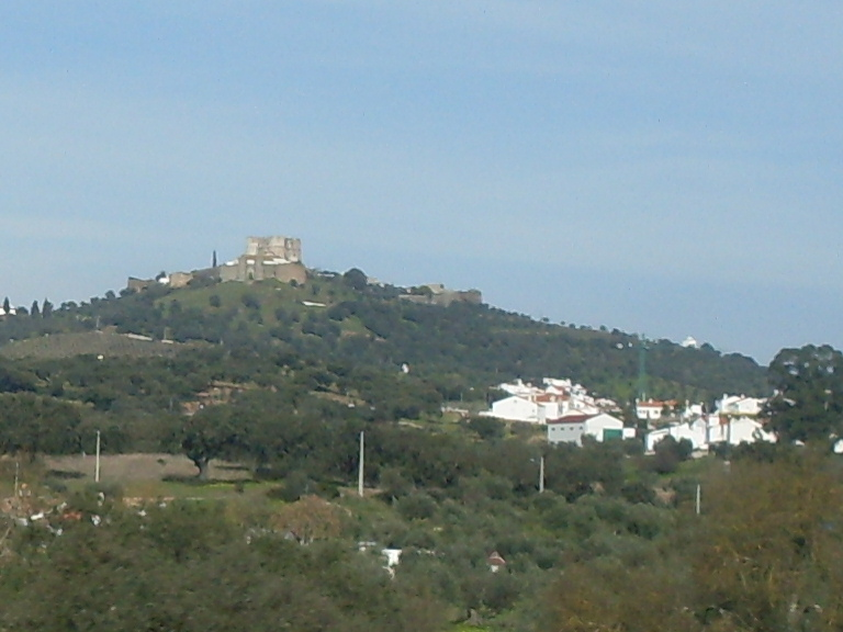 Vista de Evoramonte a partir da A6